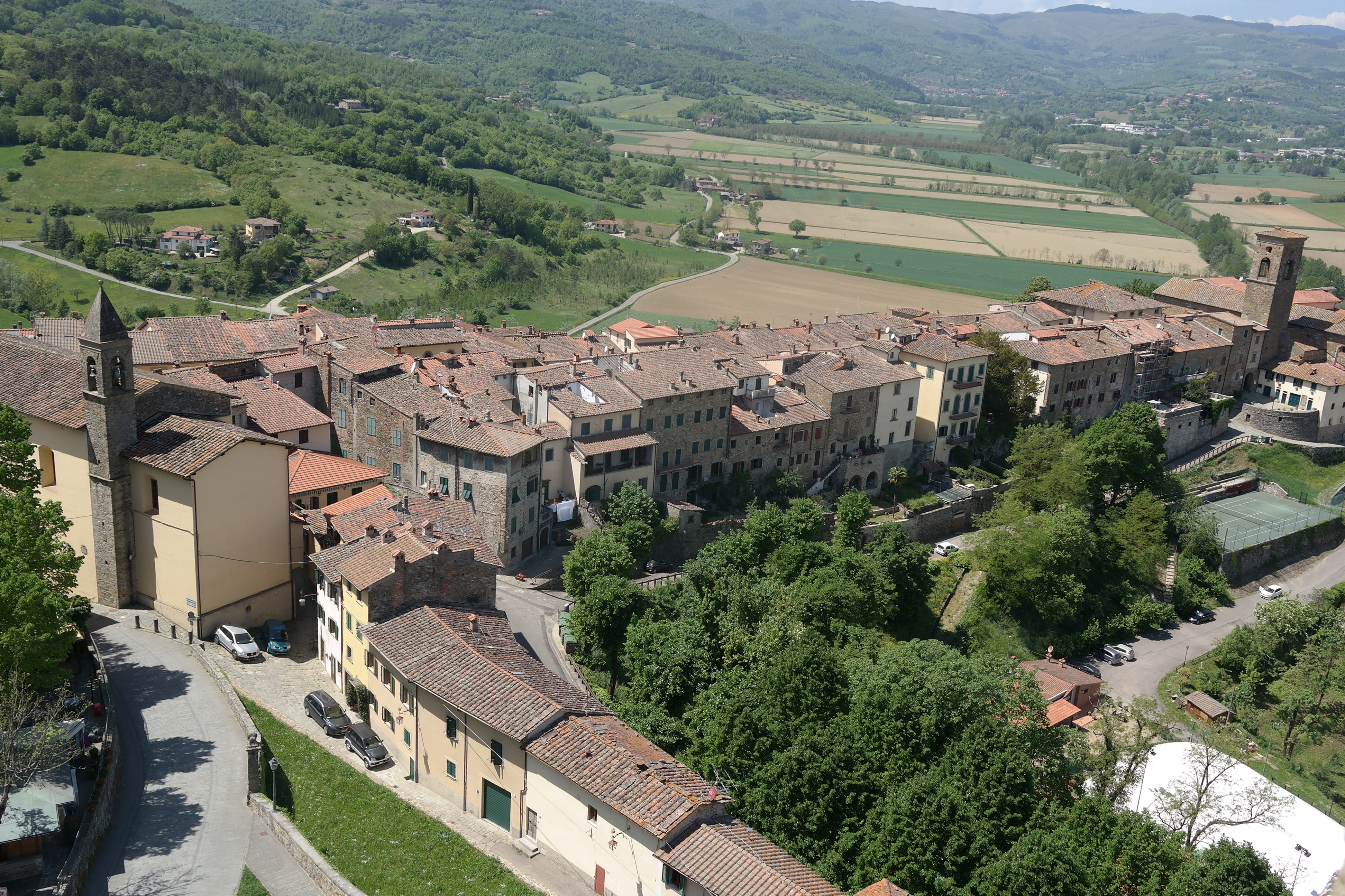 Panorama di Poppi dalla Torre del Castello dei Guidi